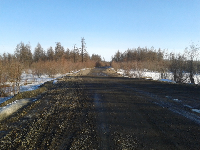 Поворот